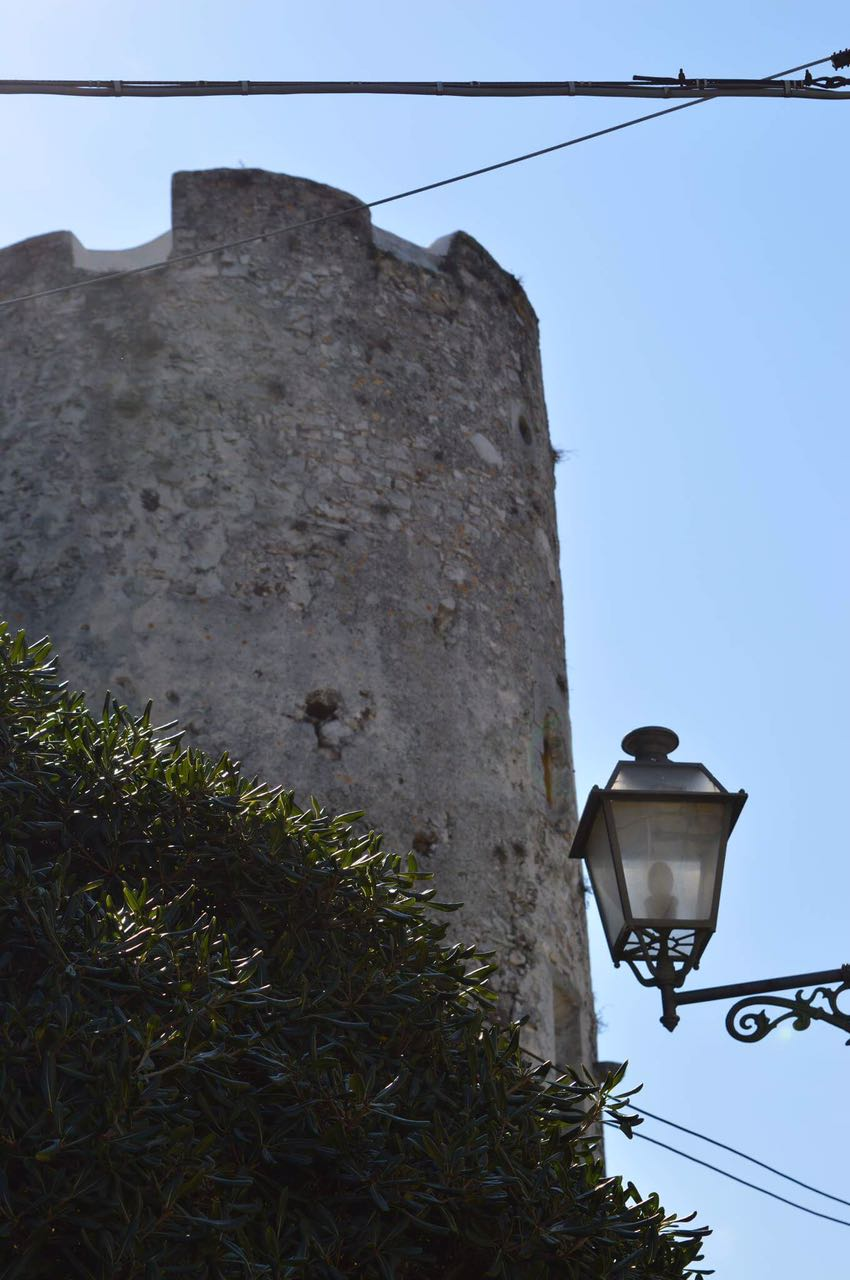 una delle torri della cinta muraria di Vico del G.